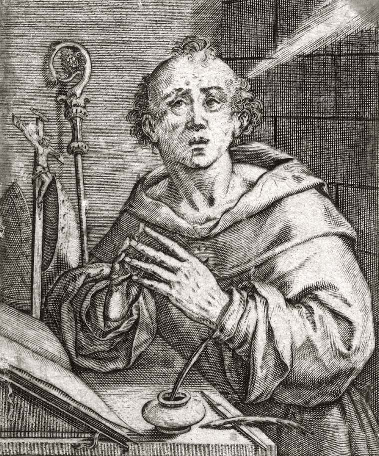 gravure (taille-douce et burin) de Saint-Augustin sur fond de scriptorium. Dimensions : 55x45 mm.